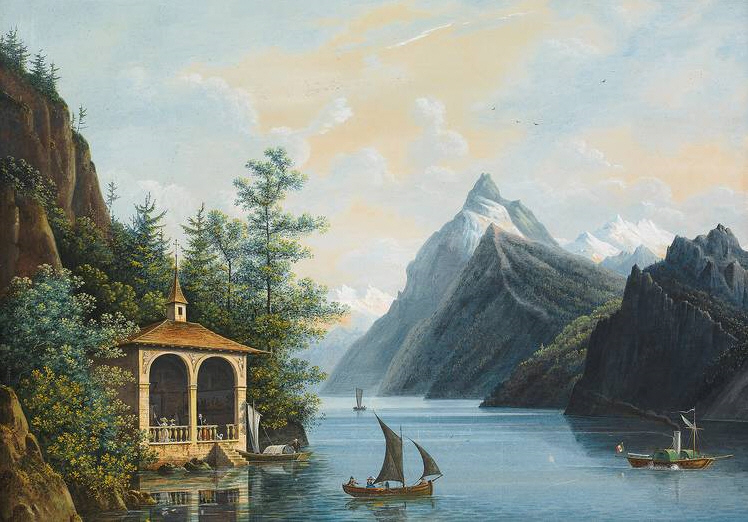 „Die Tellskapelle am Vierwaldstätter See bei Luzern“, Gouache. 48,5 x 67 cm